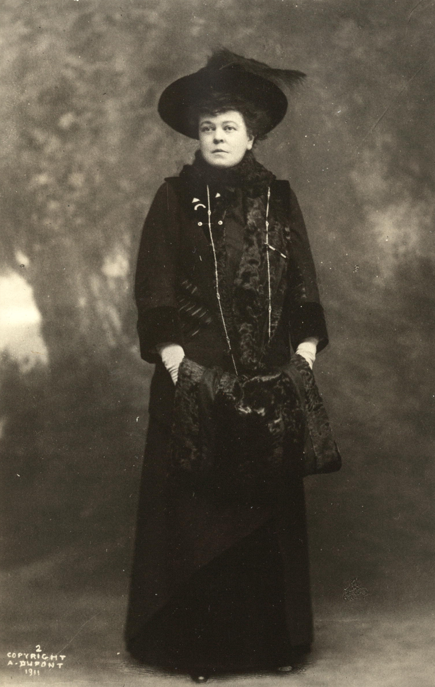 Title: Alva E. Belmont.